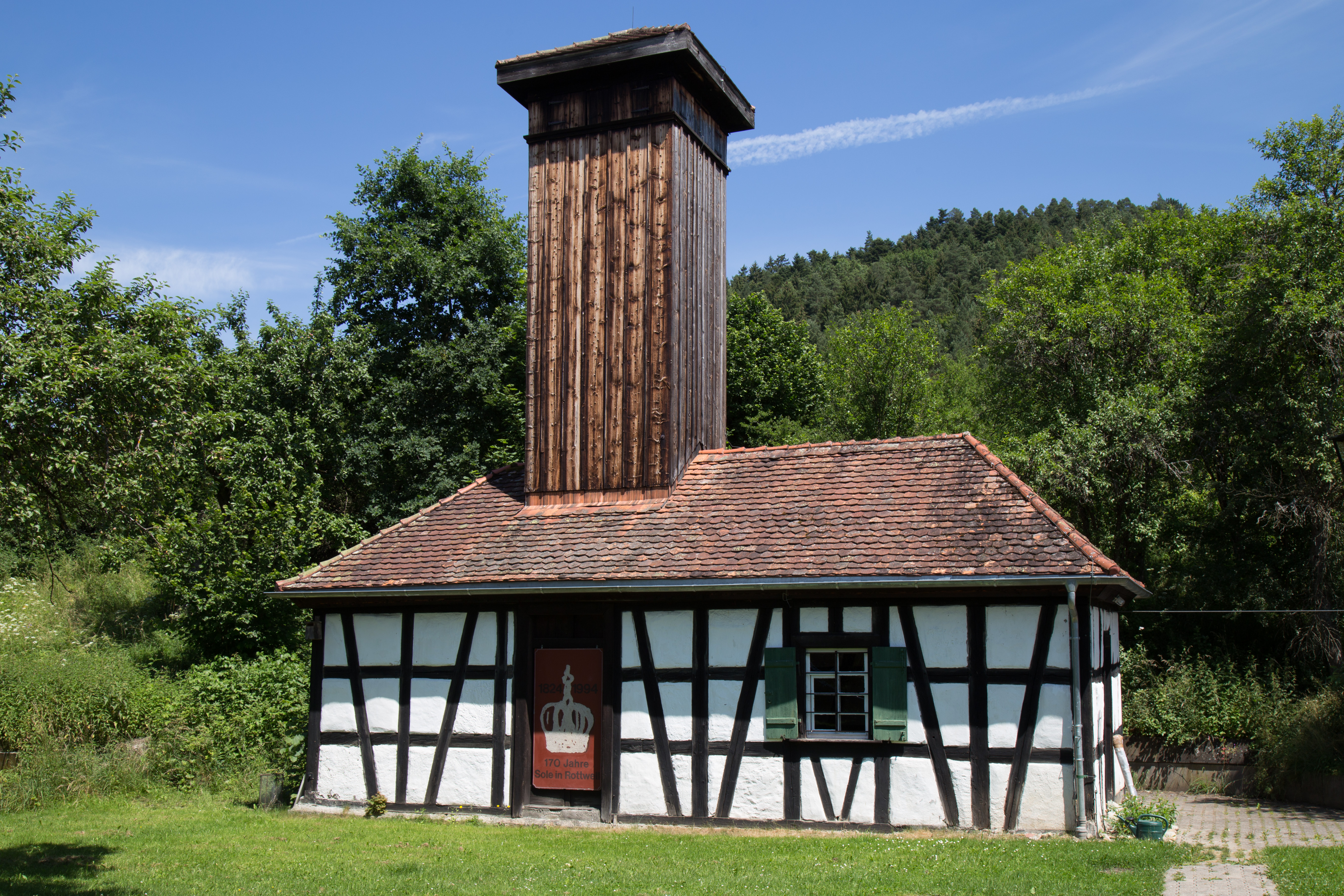 Unteres Bohrhaus der Saline Wilhelmshall (heute Salinenmuseum) in Rottweil